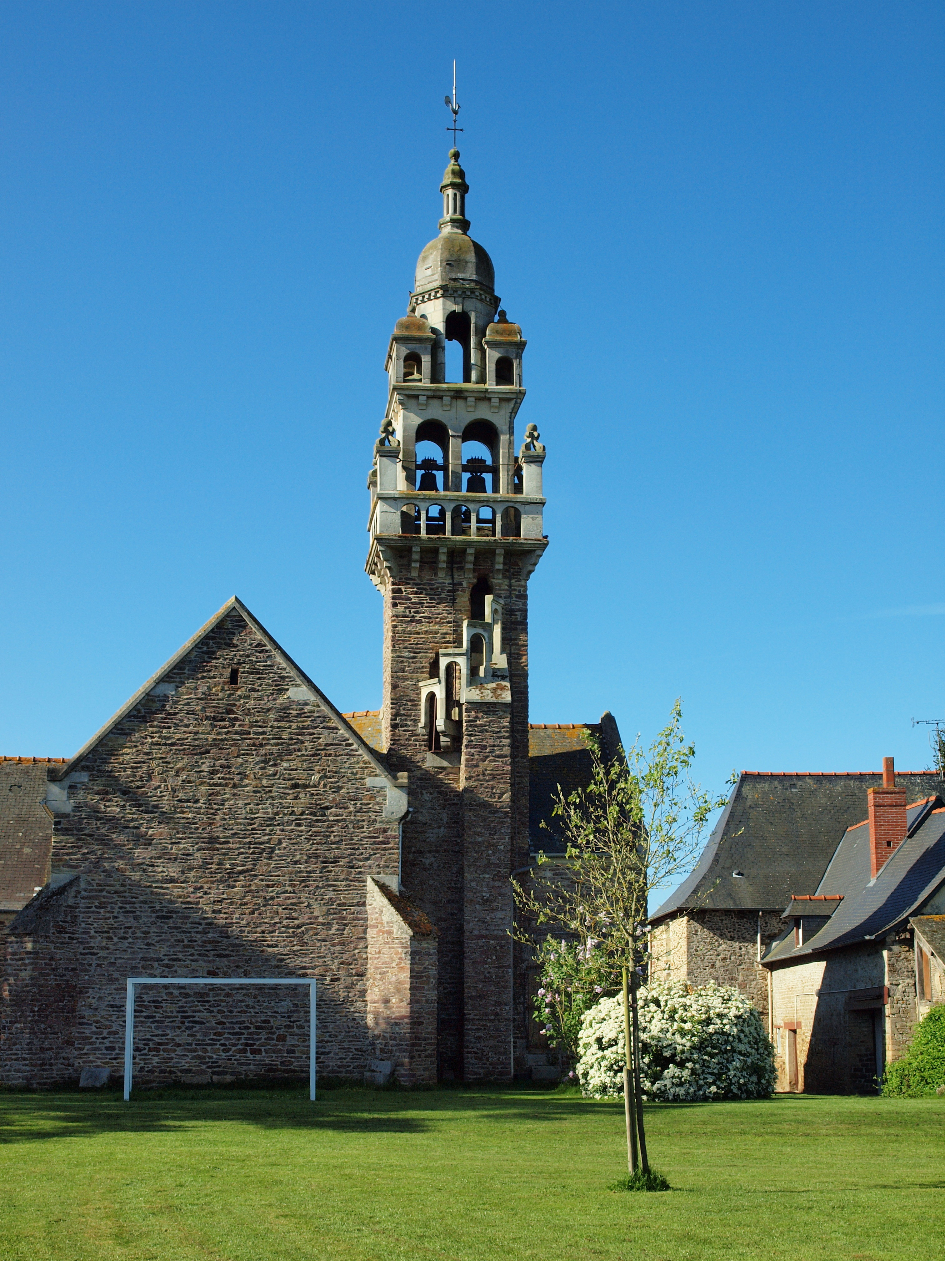 Église de la Sainte-Trinité à Moussé (Ille-et-Vilaine, France)